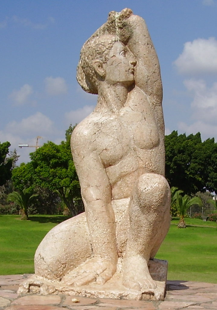 Sculpture